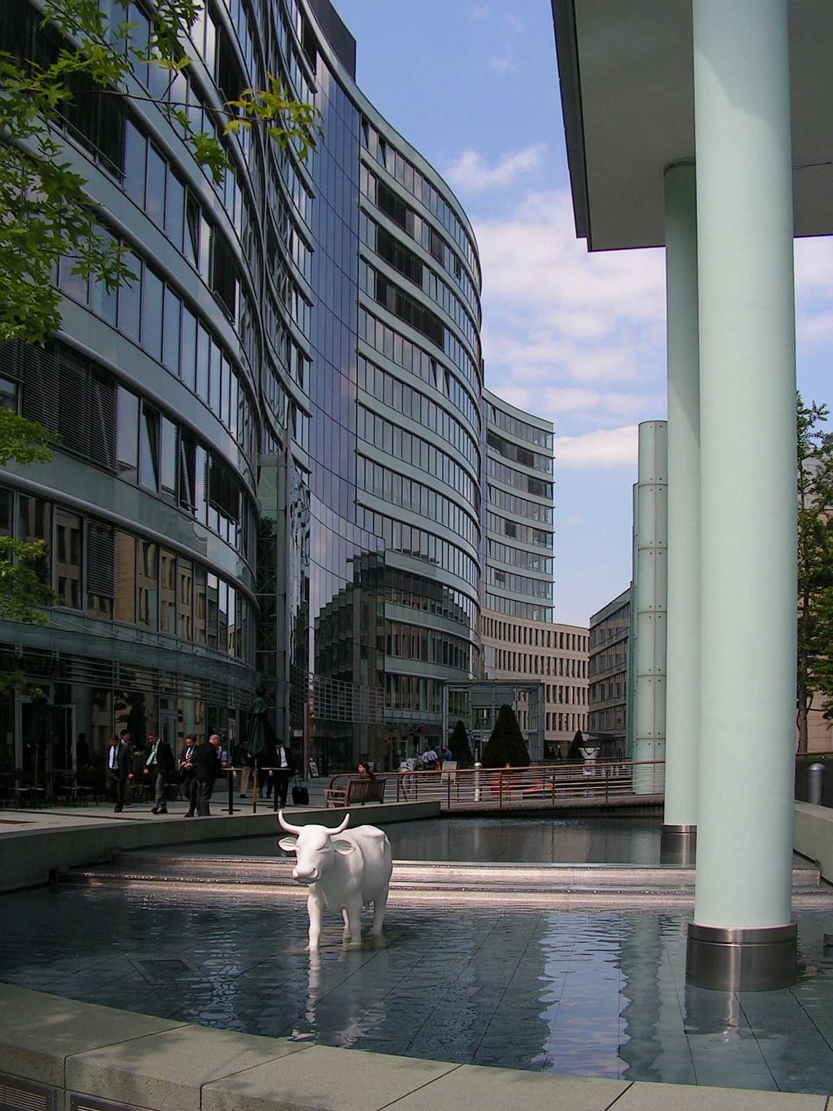 Frankfurt am Main Hochhauskomplex An der Welle Höhe 55 m 13 Etagen JSK Architekten Joos Slapa Krüger-Heyden Foto 2005 Wolfgang Pehlemann Wiesbaden PICT0200